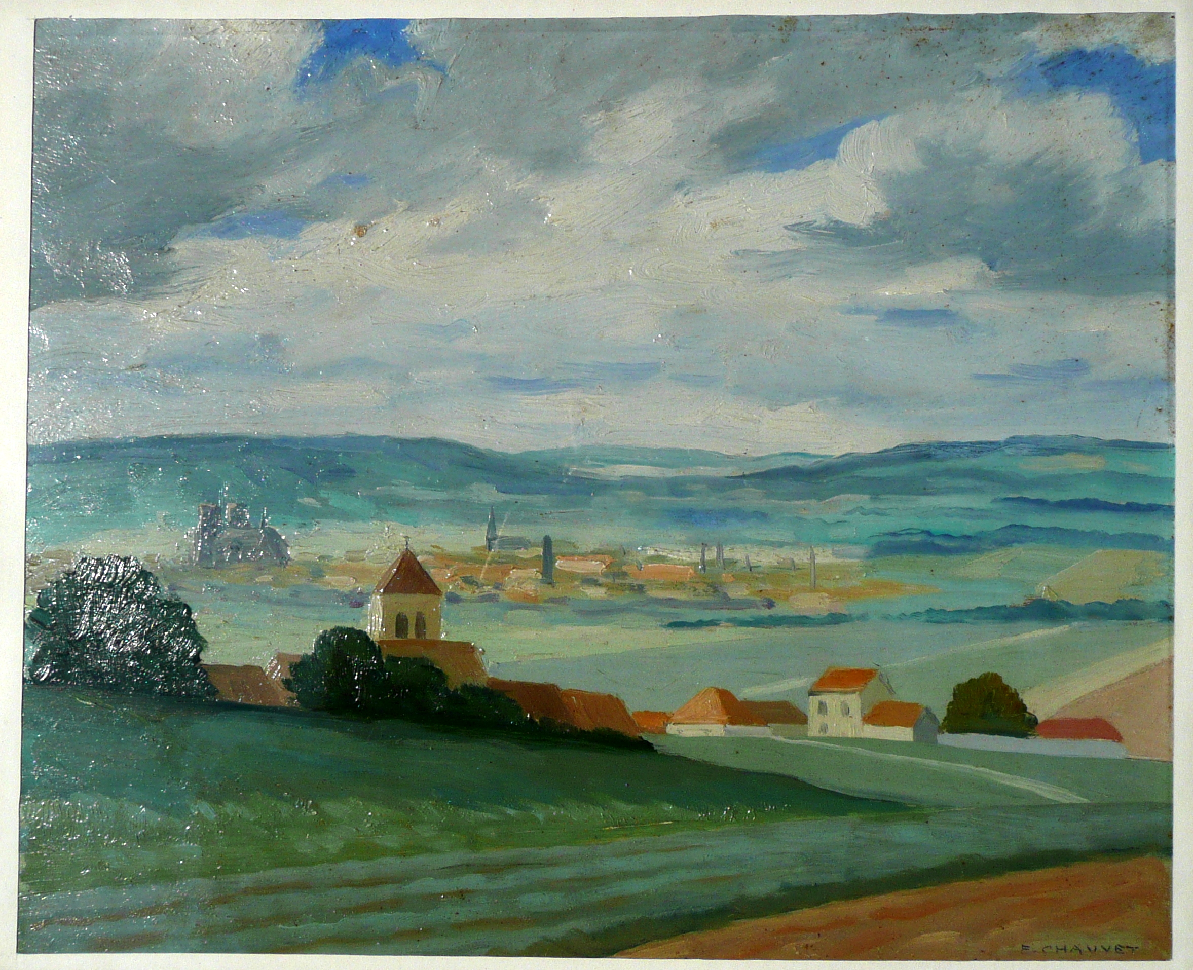 Peinture par Edmond Chauvet, vers 1930